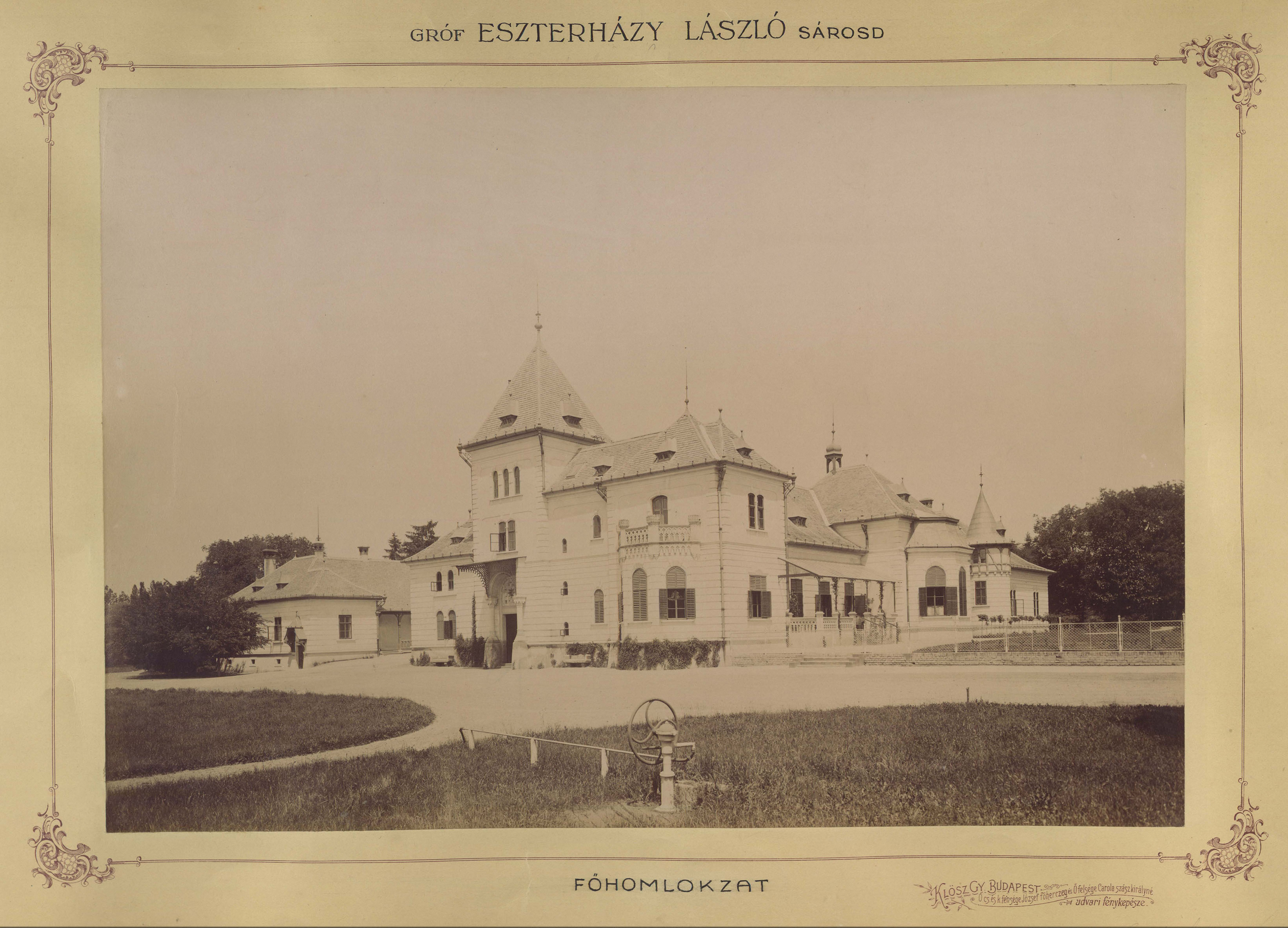 az Esterházy-kastély főhomlokzata. A felvétel 1895-1899 között készült. A kép forrását kérjük így adja meg: Fortepan / Budapest Főváros Levéltára. Levéltári jelzet: HU.BFL.XV.19.d.1.11.042 Location: Hungary, Sárosd